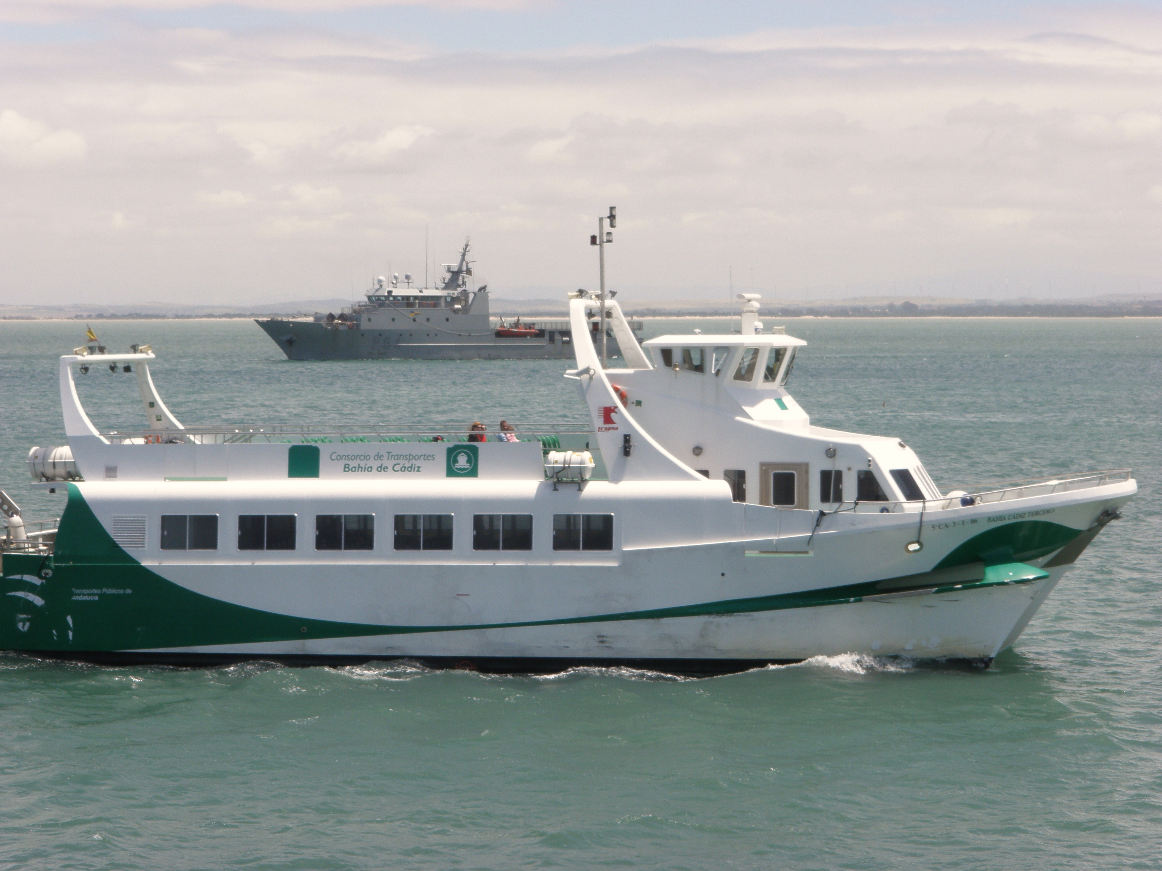 Catamarán El Puerto-Cádiz, visto desde tierra